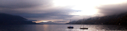 Le lac Majeur -Italie